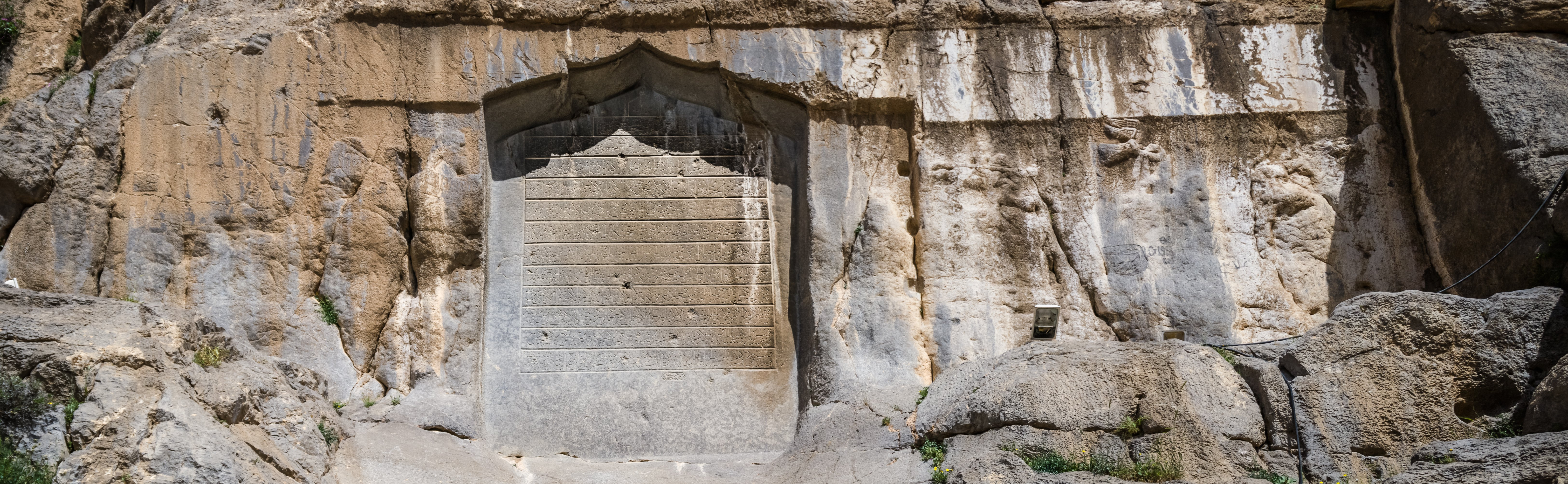 نقش برجسته پیروزی گودرز دوم اشکانی و وقف نامه شیخ علی خان زنگنه در بیستون کرمانشاه